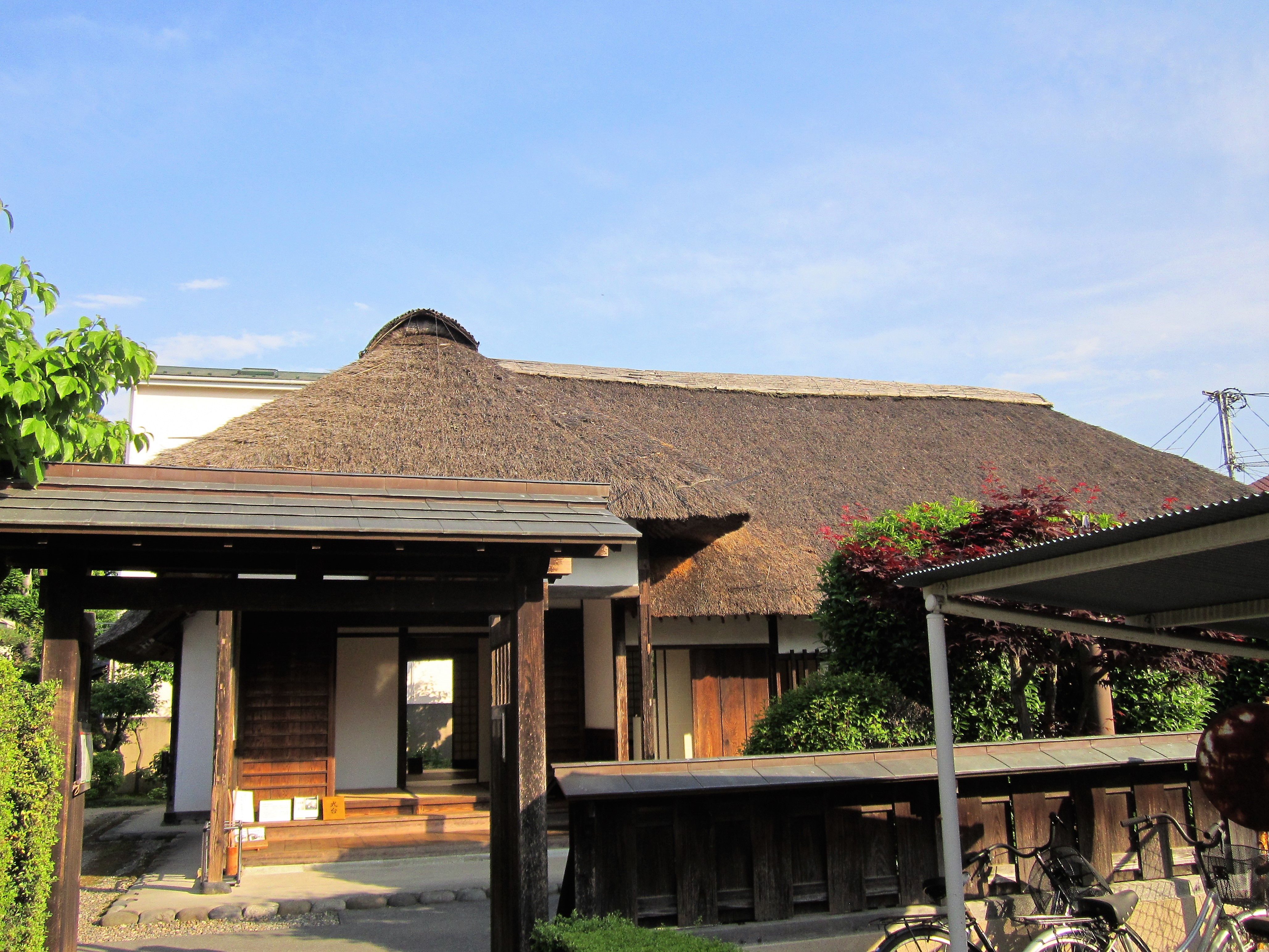 岩槻藩遷喬館（さいたま市岩槻区本町） Canon PowerShot A2200